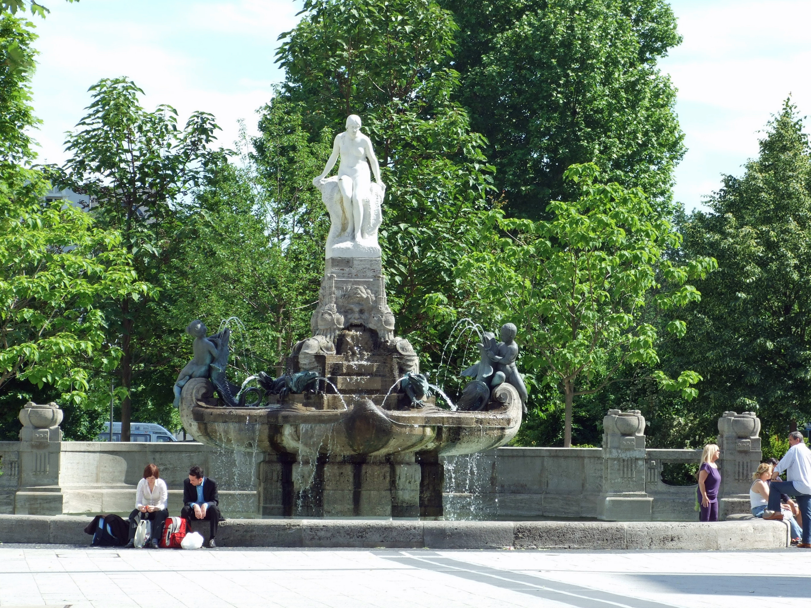 Märchenbrunnen am Theater auf der Untermainanlage am Willy-Brandt-Platz in Ffm; Bildhauer: Friedrich Christoph Hausmann (1860-1936)